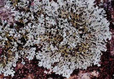 Physcia millegrana